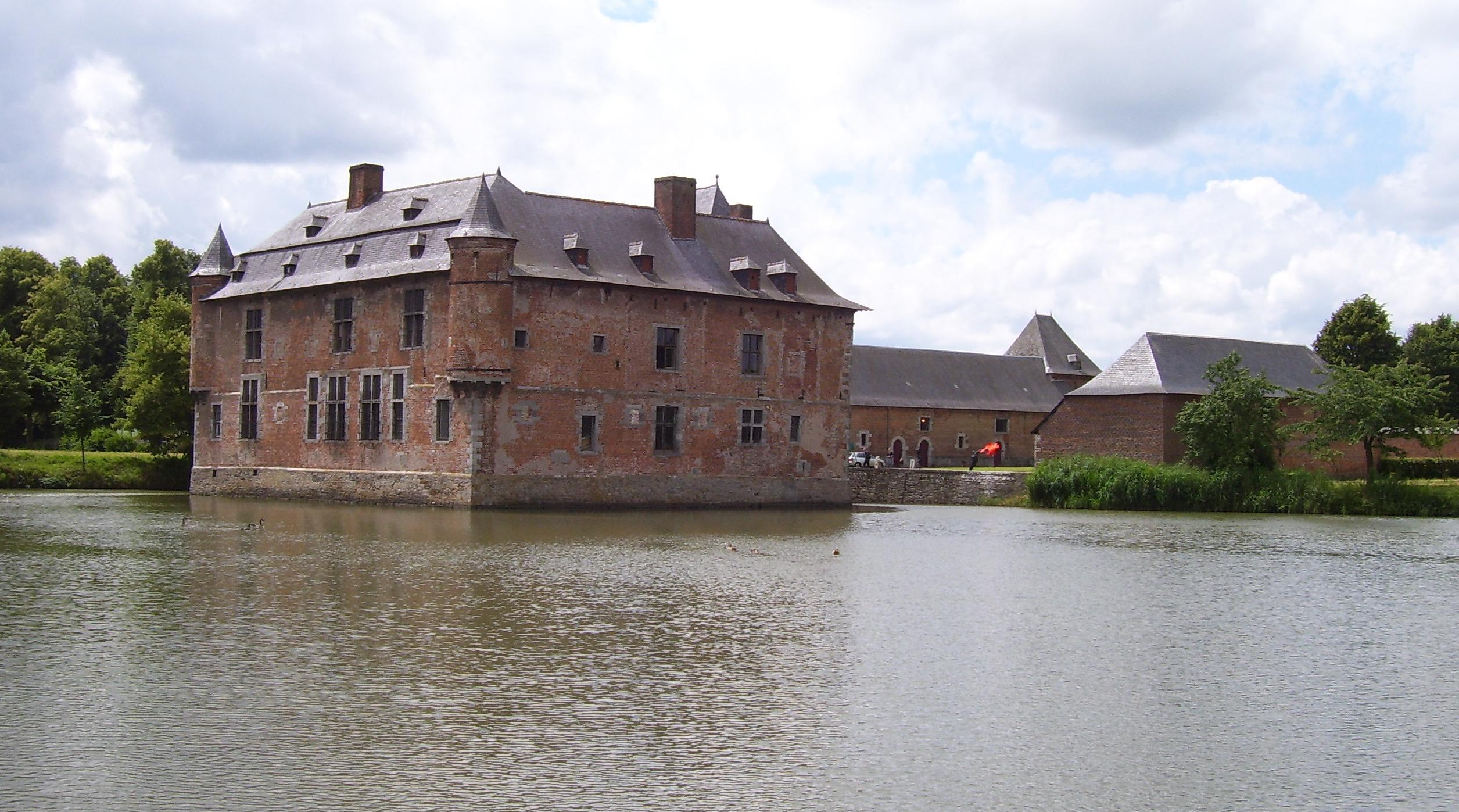 Château de Fernelmont, Noville-Les-Bois (Fernelmont), Belgium